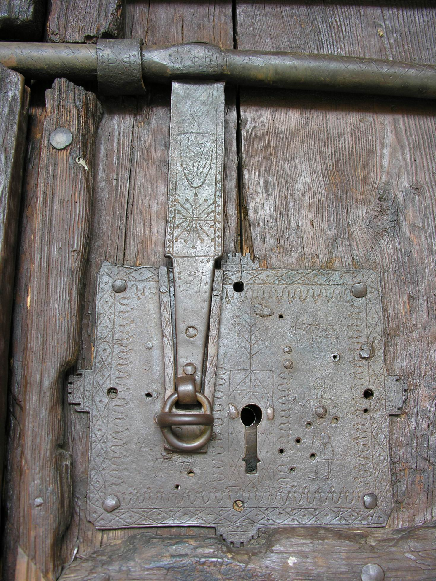 Porta de l'Església de la Nativitat de Durro (Ribagorça)